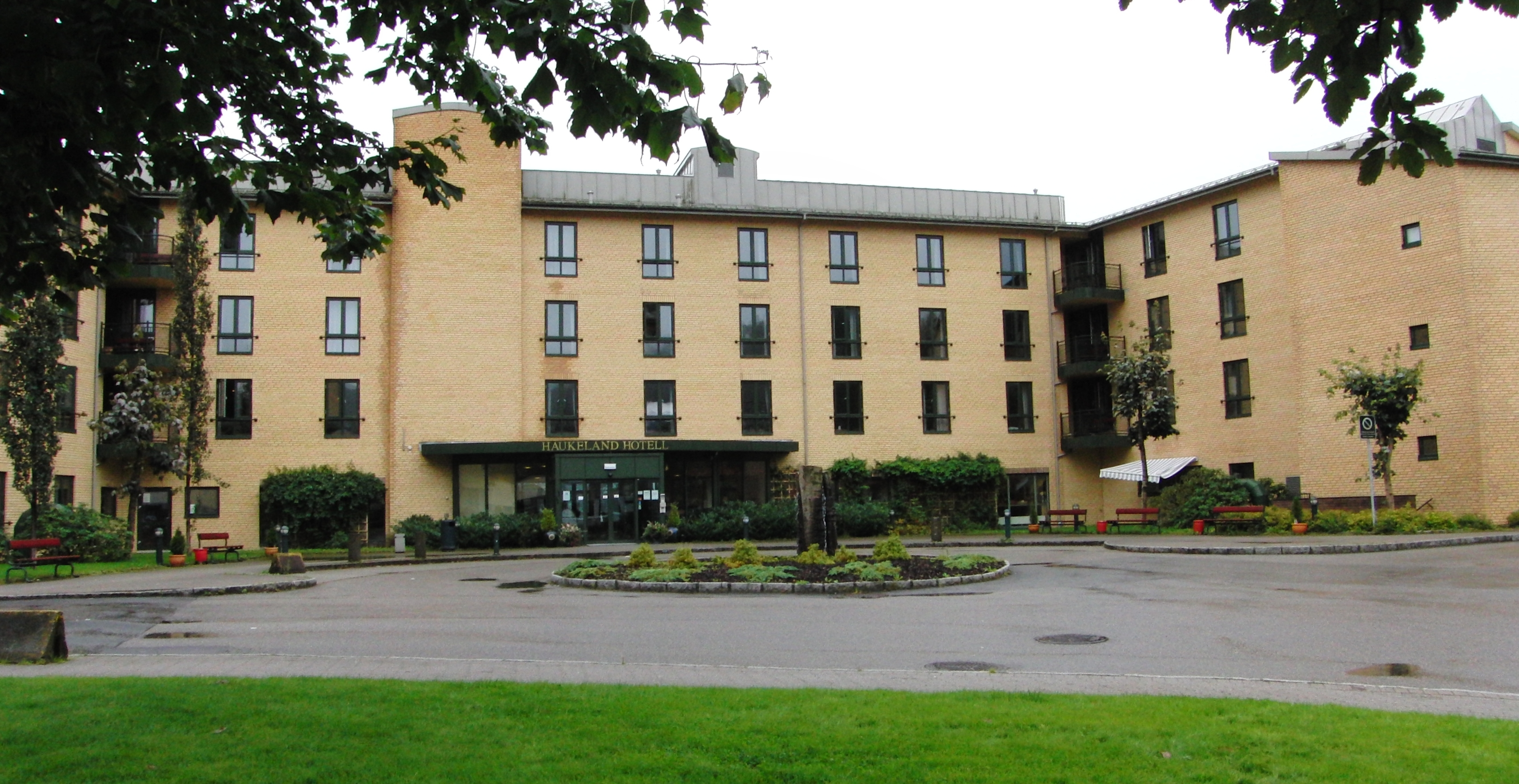 Description=Haukeland Universitetssykehus